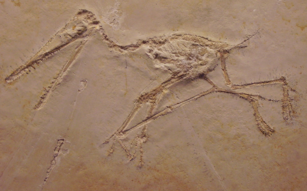 Pterodactylus kochi, OUMNH